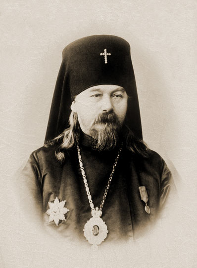 Архиепископ Алексий (Опоцкий)